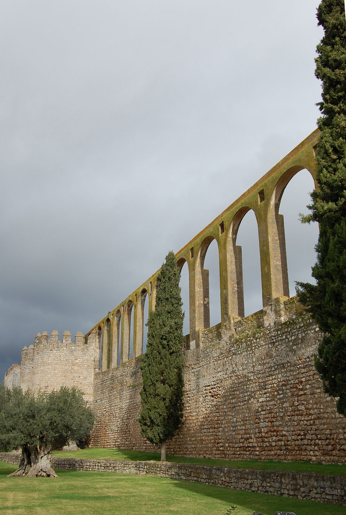 De passagem por Serpa, não resisti parar e tirar umas fotos. Fiquei com muita vontade de lá voltar e conhecer melhor esta bela localidade Alentejana ;-)